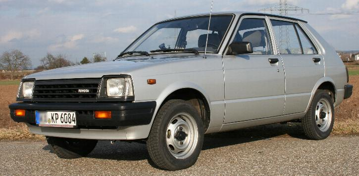 Toyota Starlet KP60 1984 (2. Modellpflege: 1982-84)